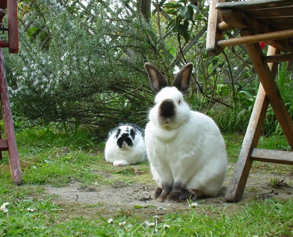 2 männliche Hauskaninchen in Freihaltung im eingezäunten Garten